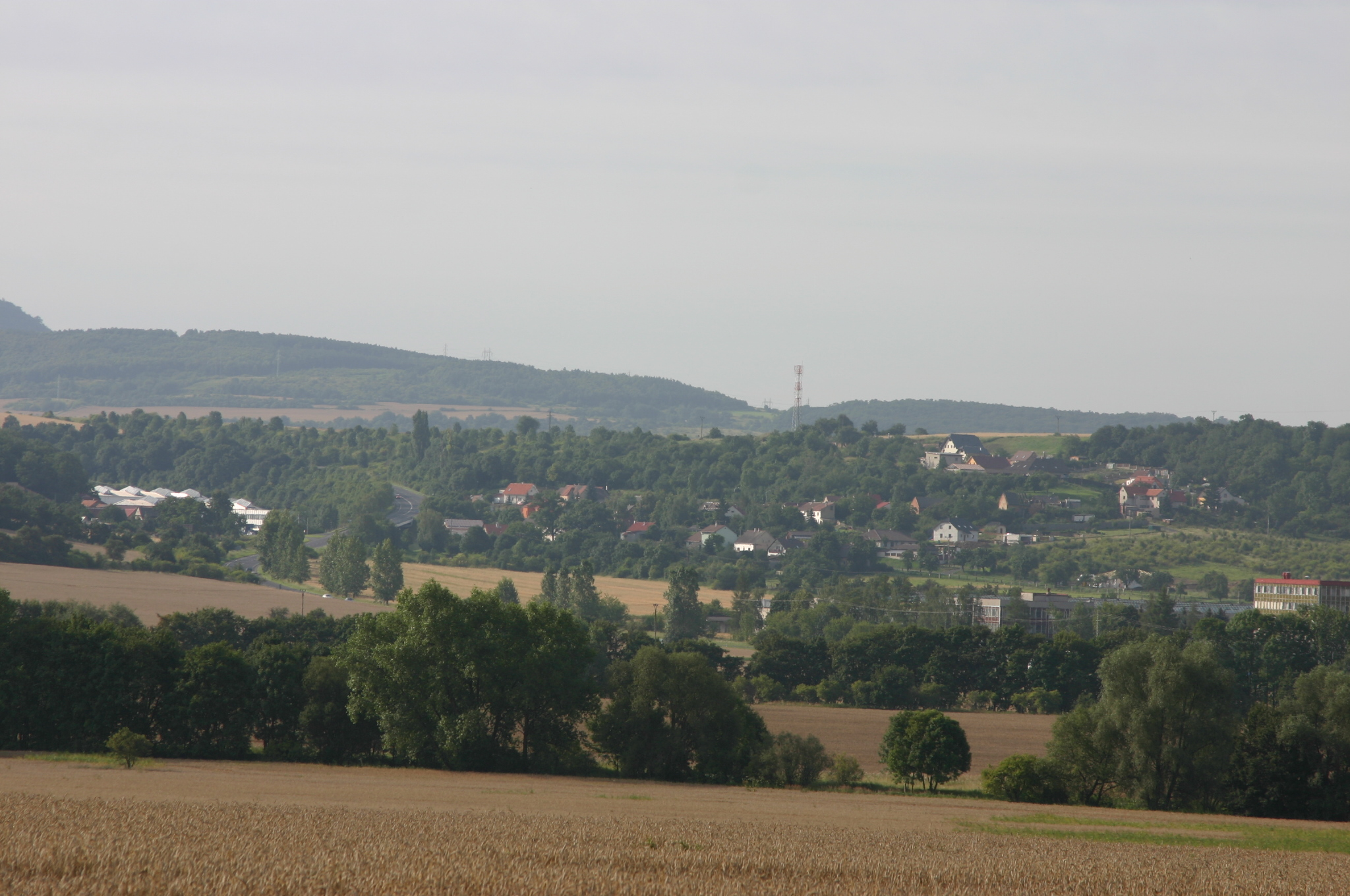 Obec Korozluky v okrese Most